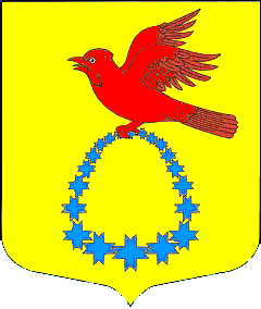 Izsorok címere